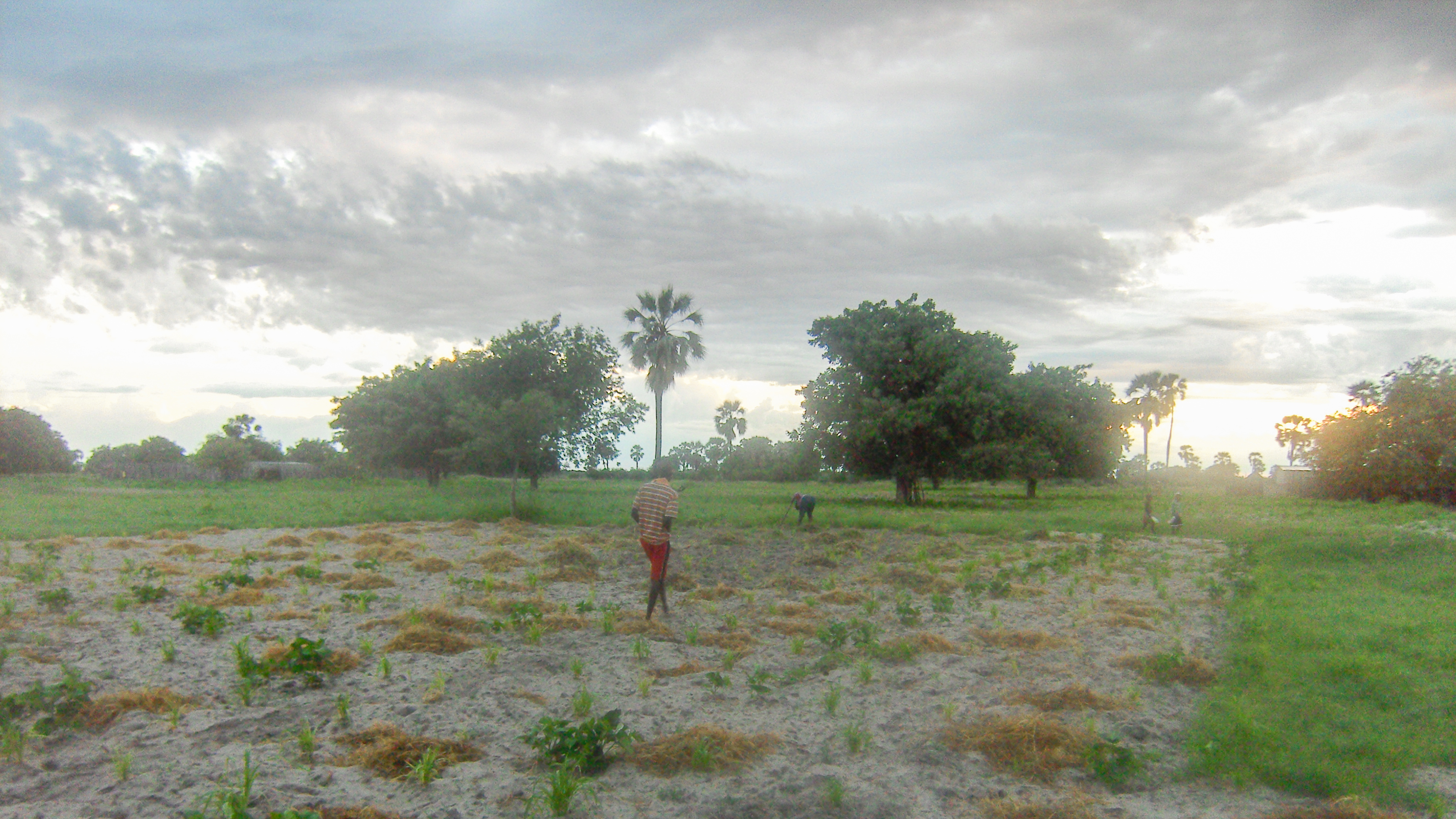 Typisches Landschaftsbild des Ovamboland (Omahangu-Anbau in der Omusati-Region, 2011).